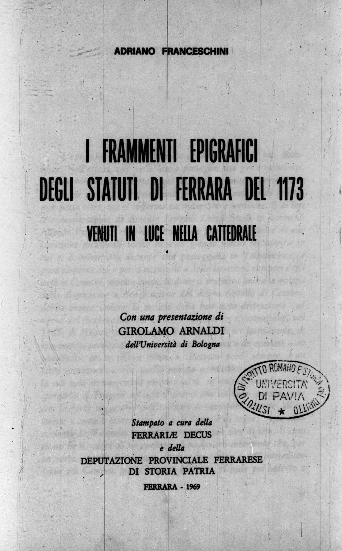 Frontespizio